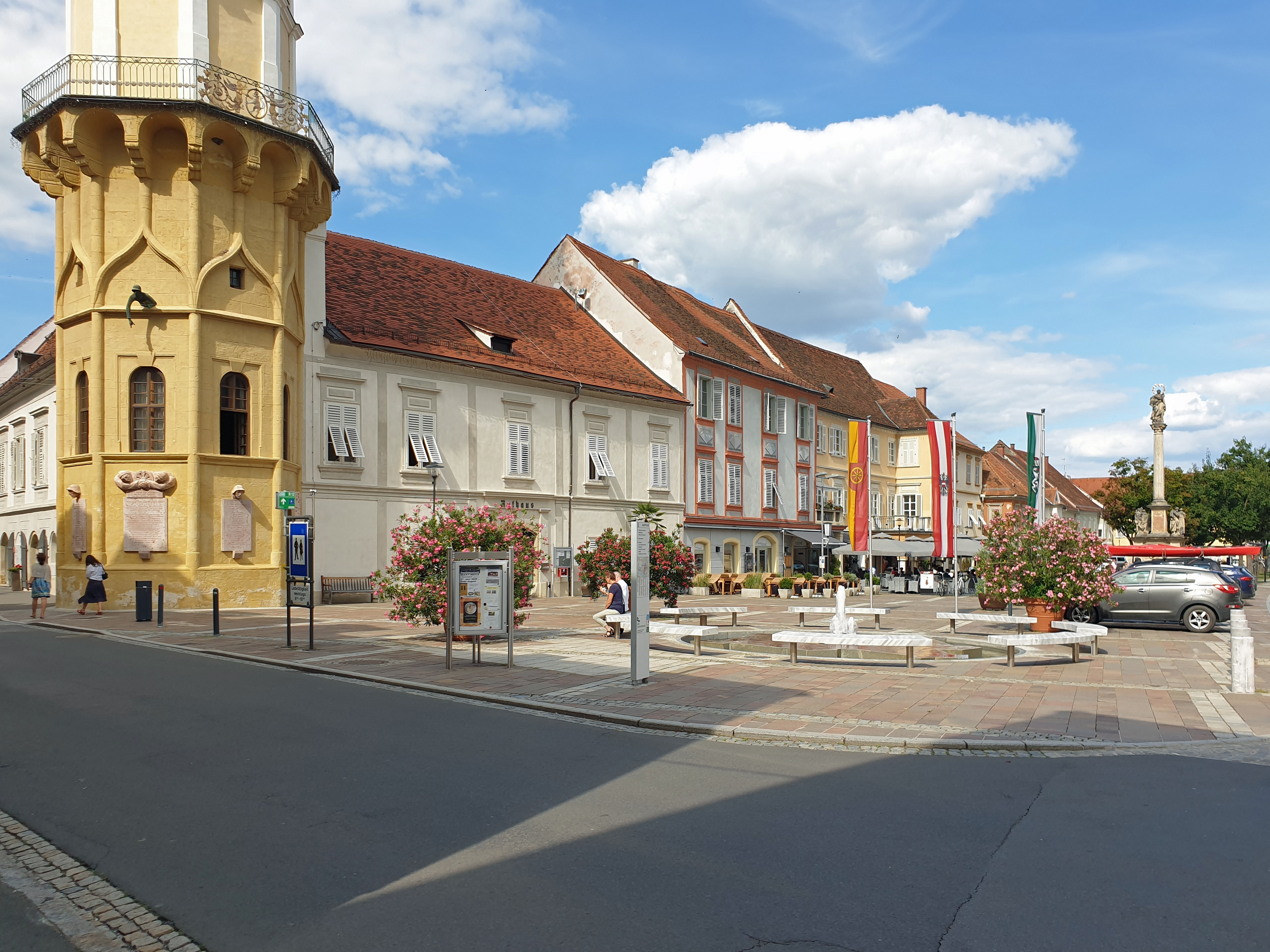 Hauptplatz Bad Radkersburg.